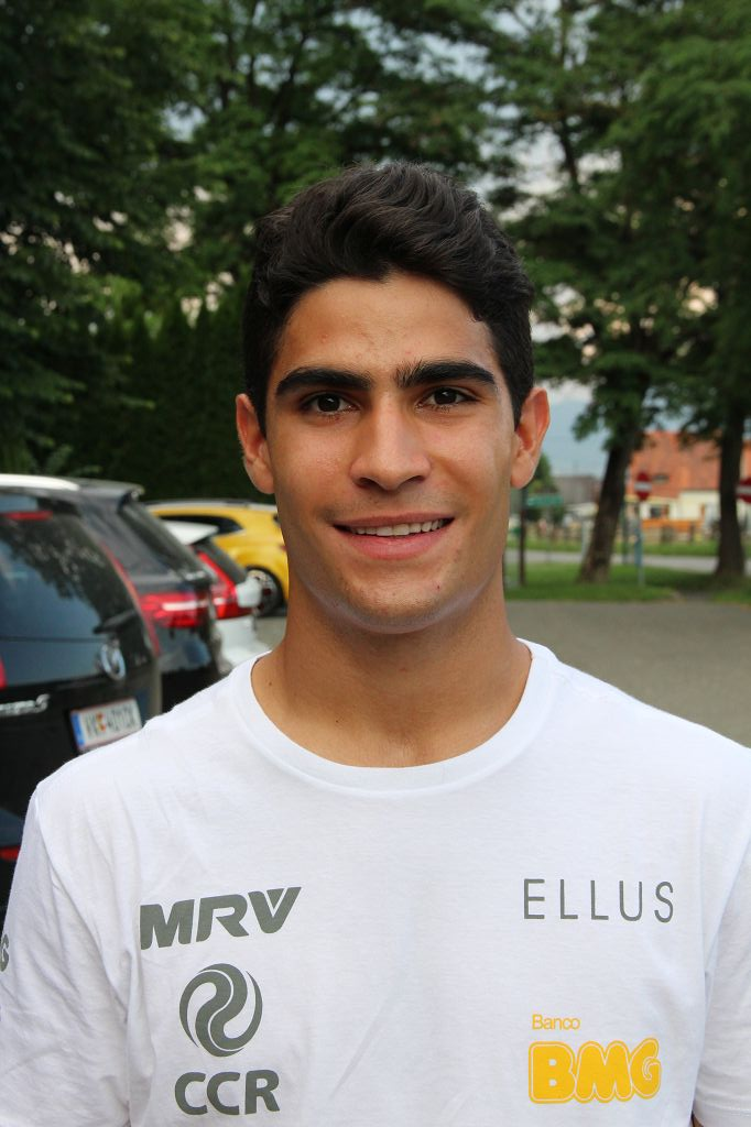 Formula 1 2019 / Schloss Gabelhofen